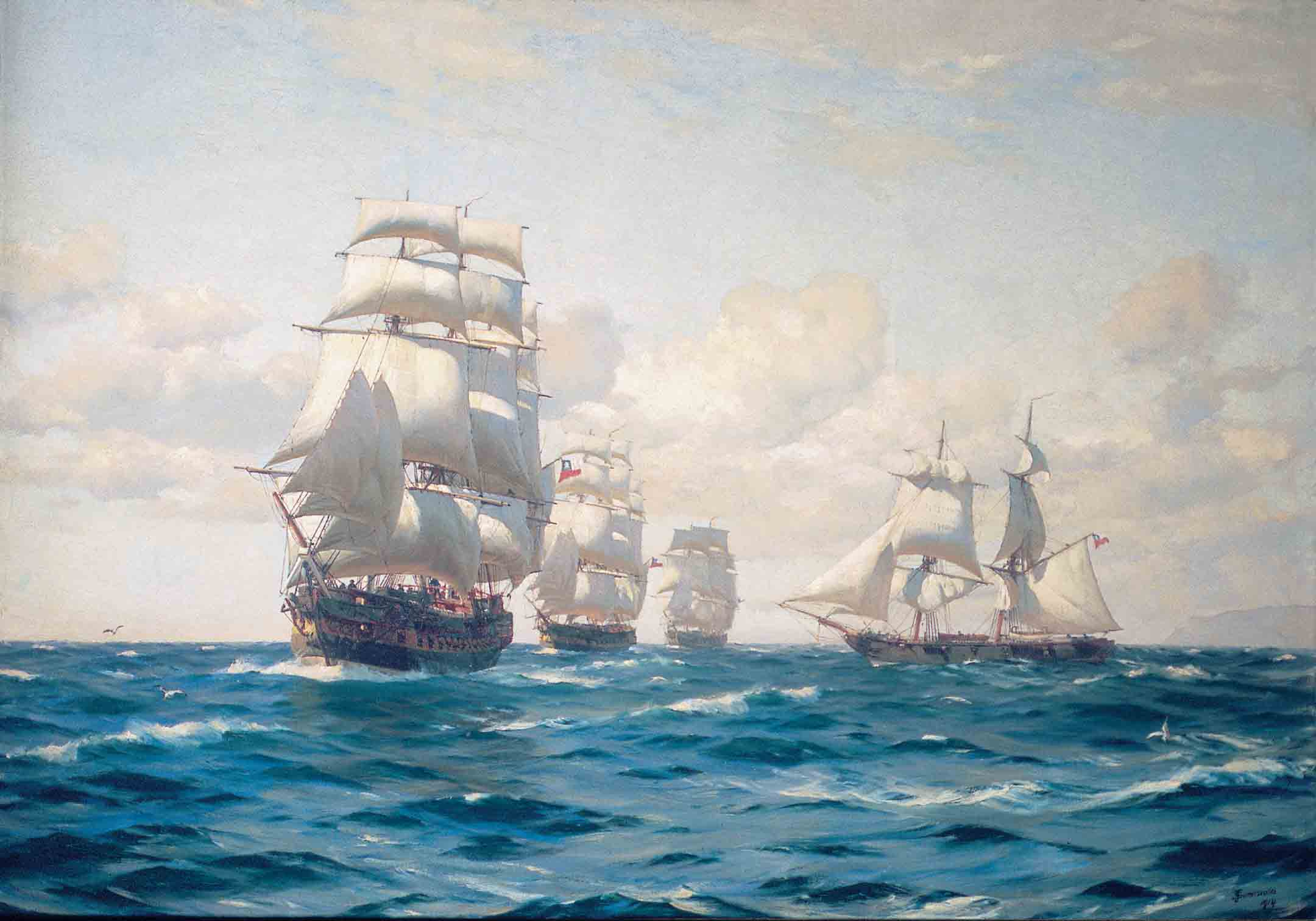 According to santiagonostalgico la Primera Escuadra de Chile. en primer plano el Navio San Martin, fragata Lautaro, corbeta Chacabuco y pequeño Bergantin Araucano